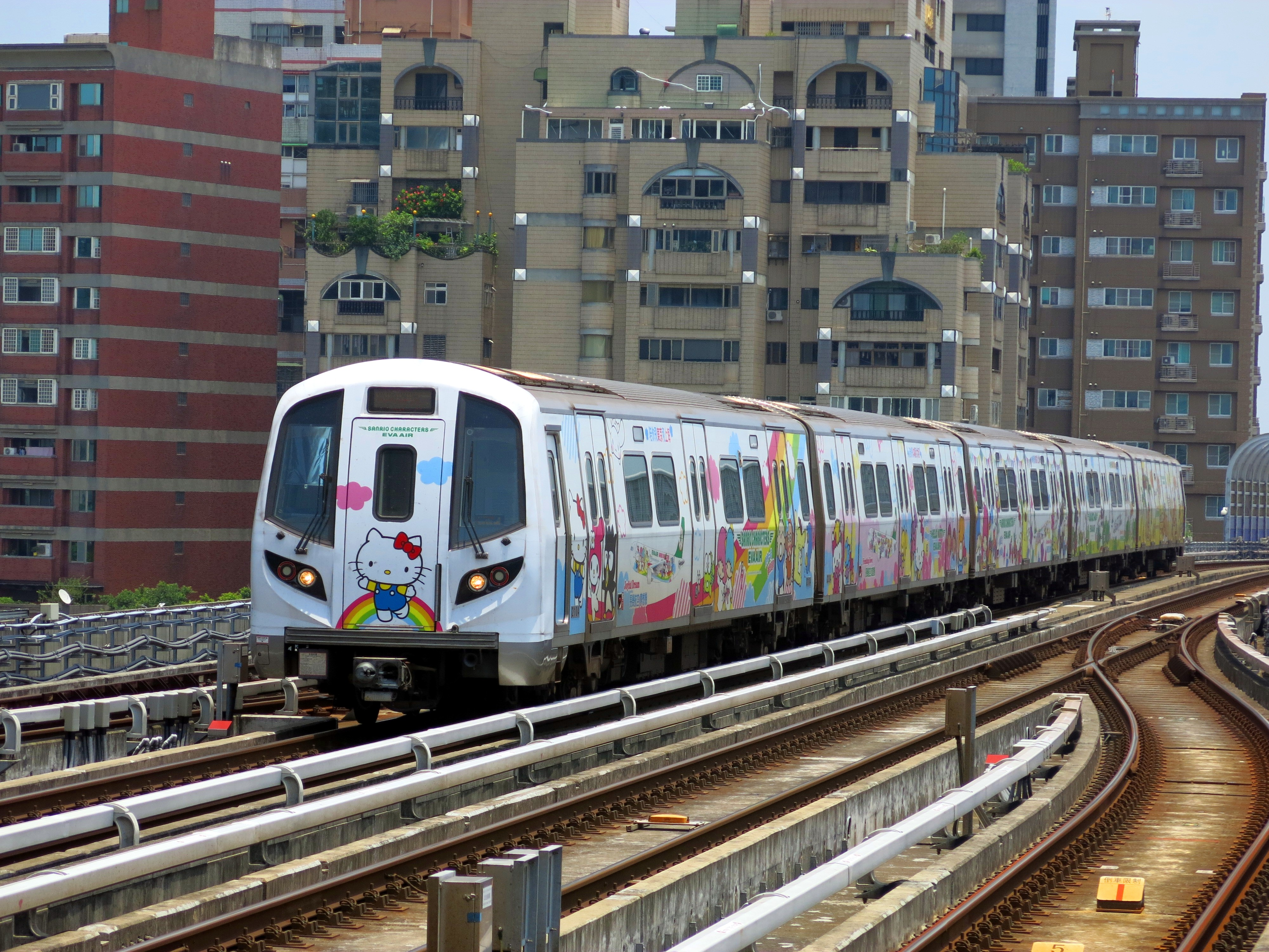 中文（台灣）: 桃園捷運機場線直達車長榮航空Hello Kitty彩繪機廣告列車，攝於林口站。